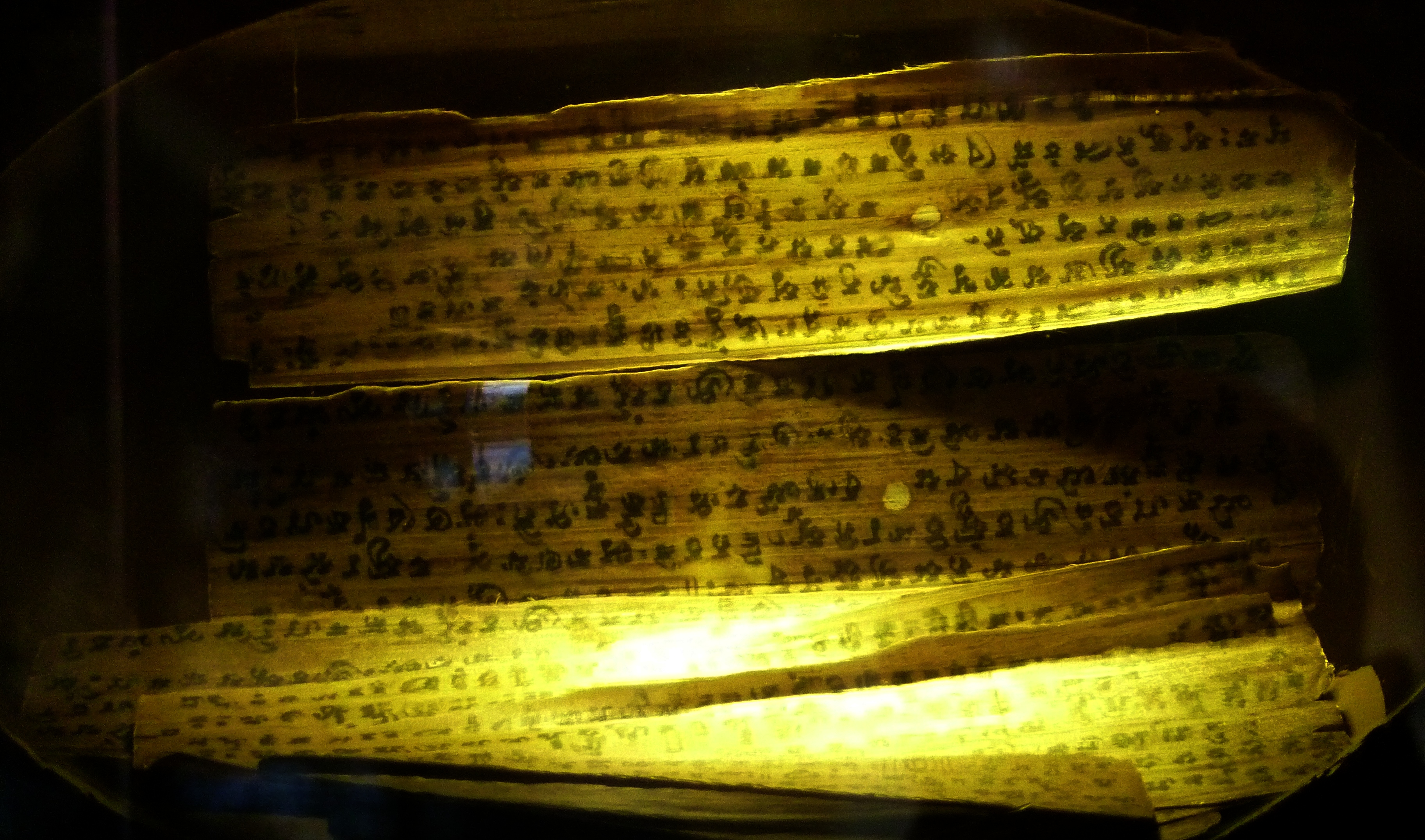 Wat Saket, Bangkok